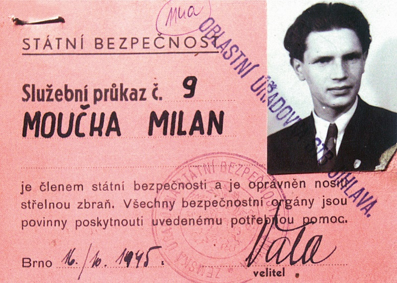 viz. karta